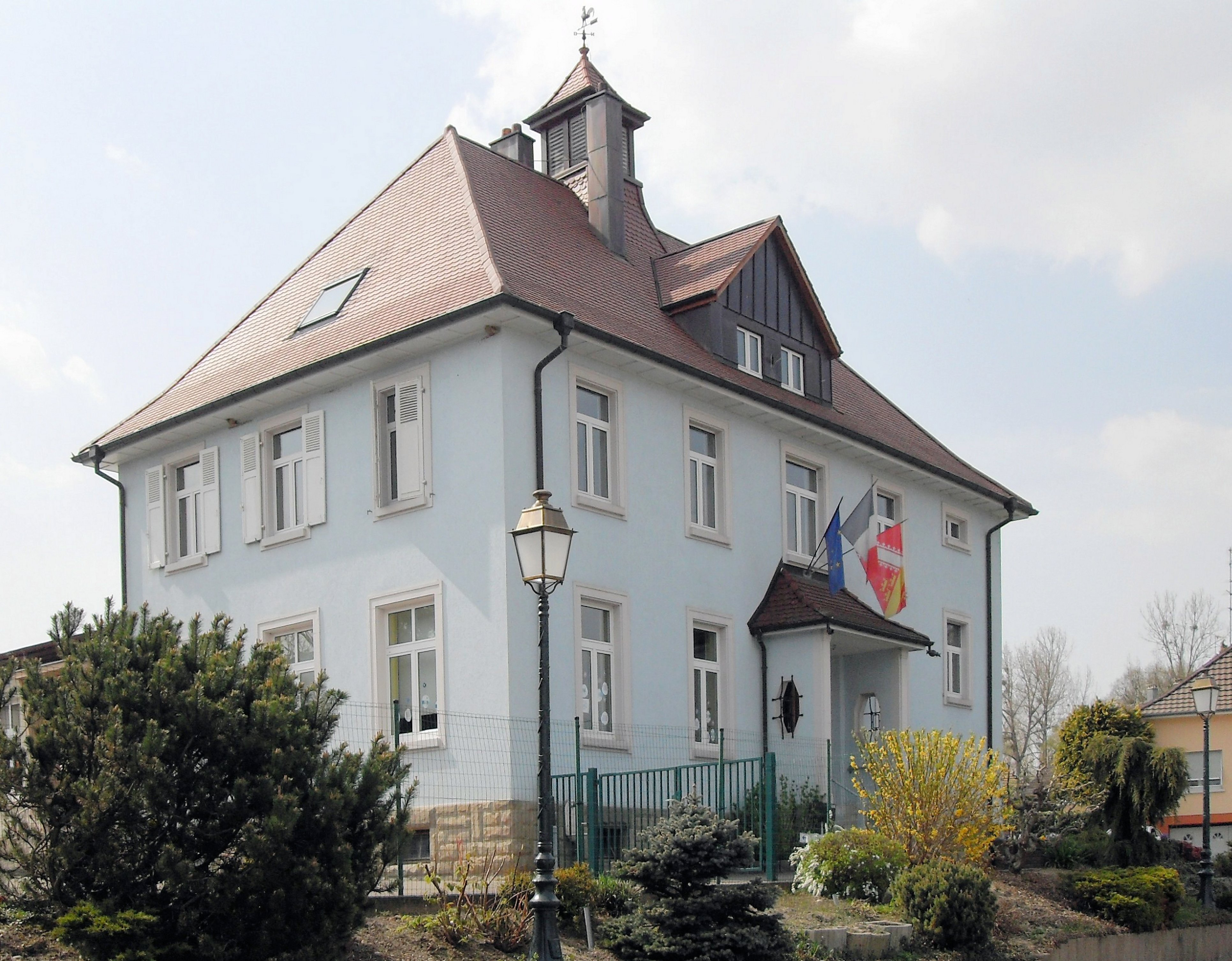 La Mairie-école de Kappelen